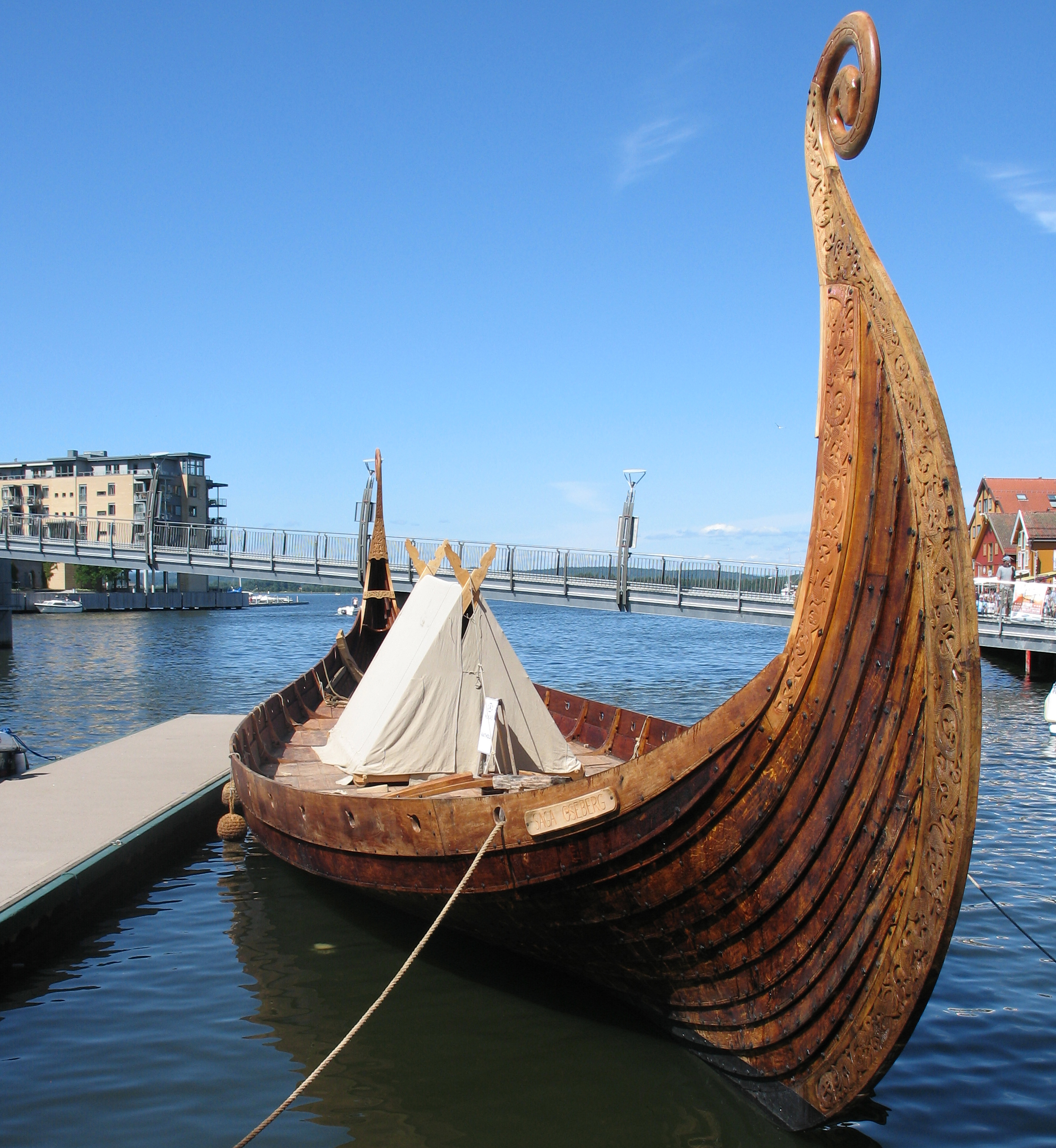 Saga Oseberg fortøyd foran Bryggekvartalet i Tønsberg